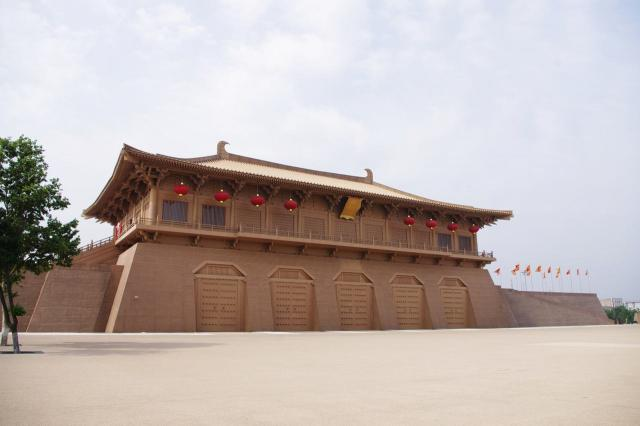 大明宫丹凤门（复原修复）